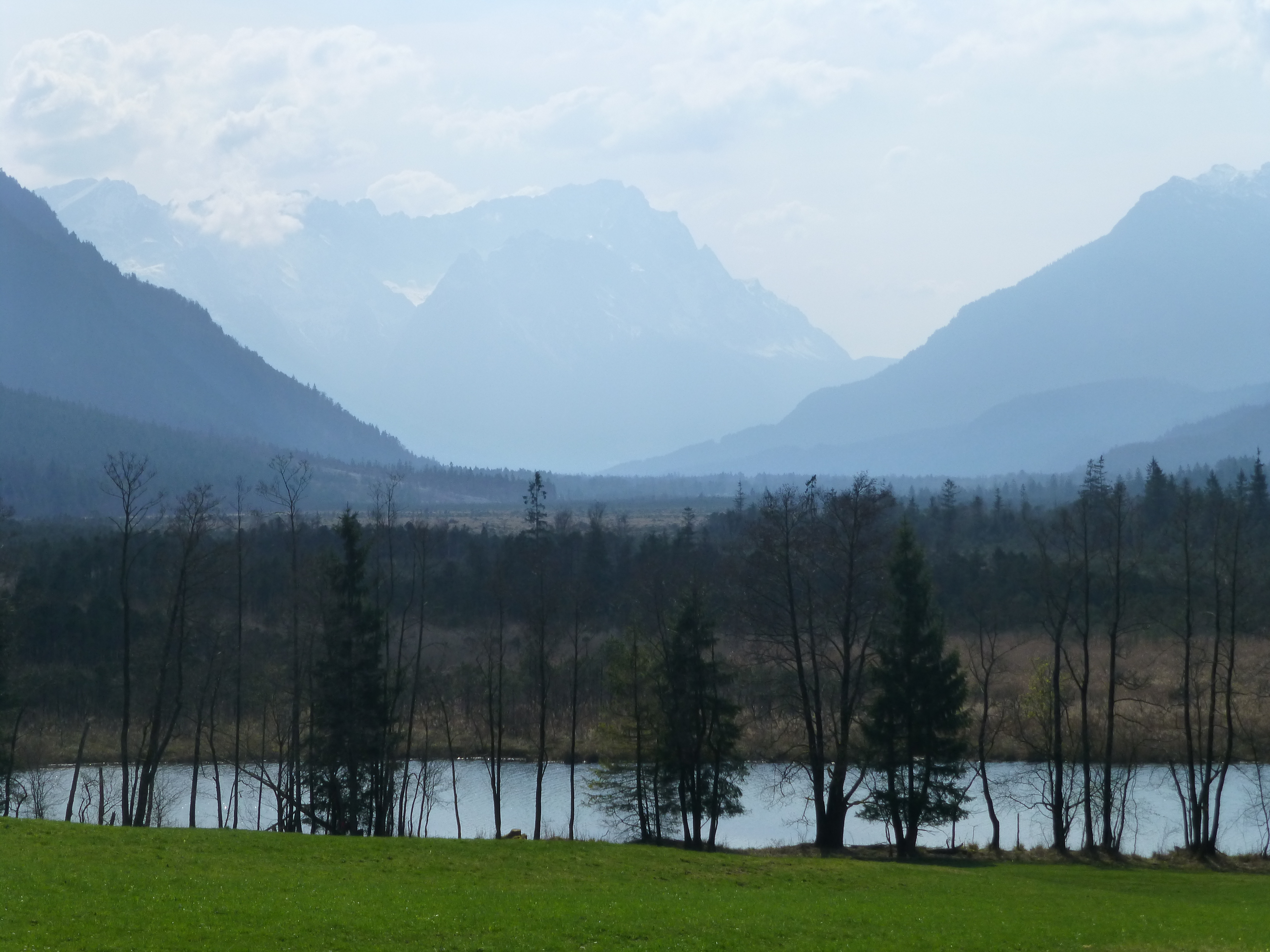 Blick über das Murnauer Moos durch das Loisachtal auf die Zugspitze